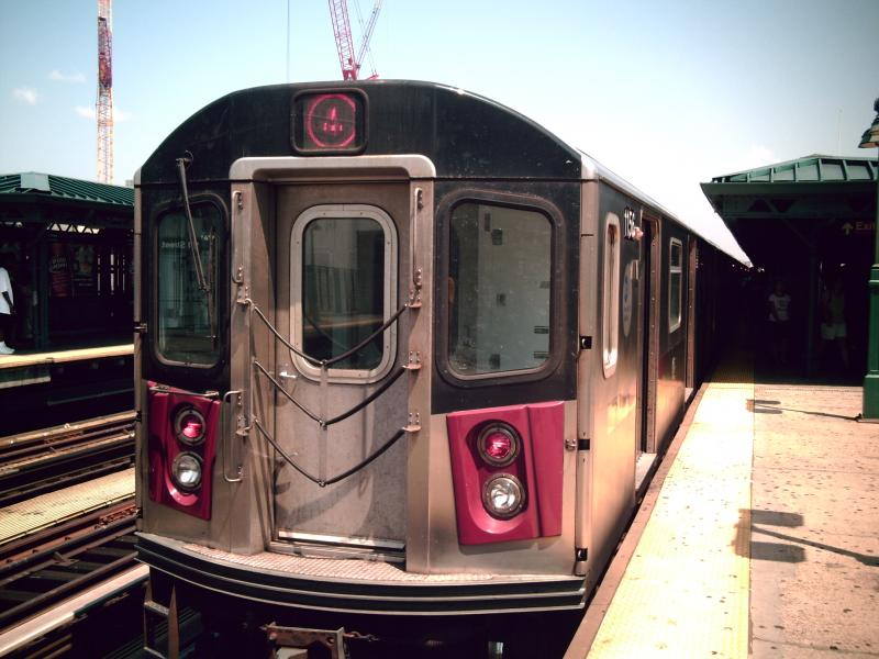 tren 4 del servicio del metro de Nueva York